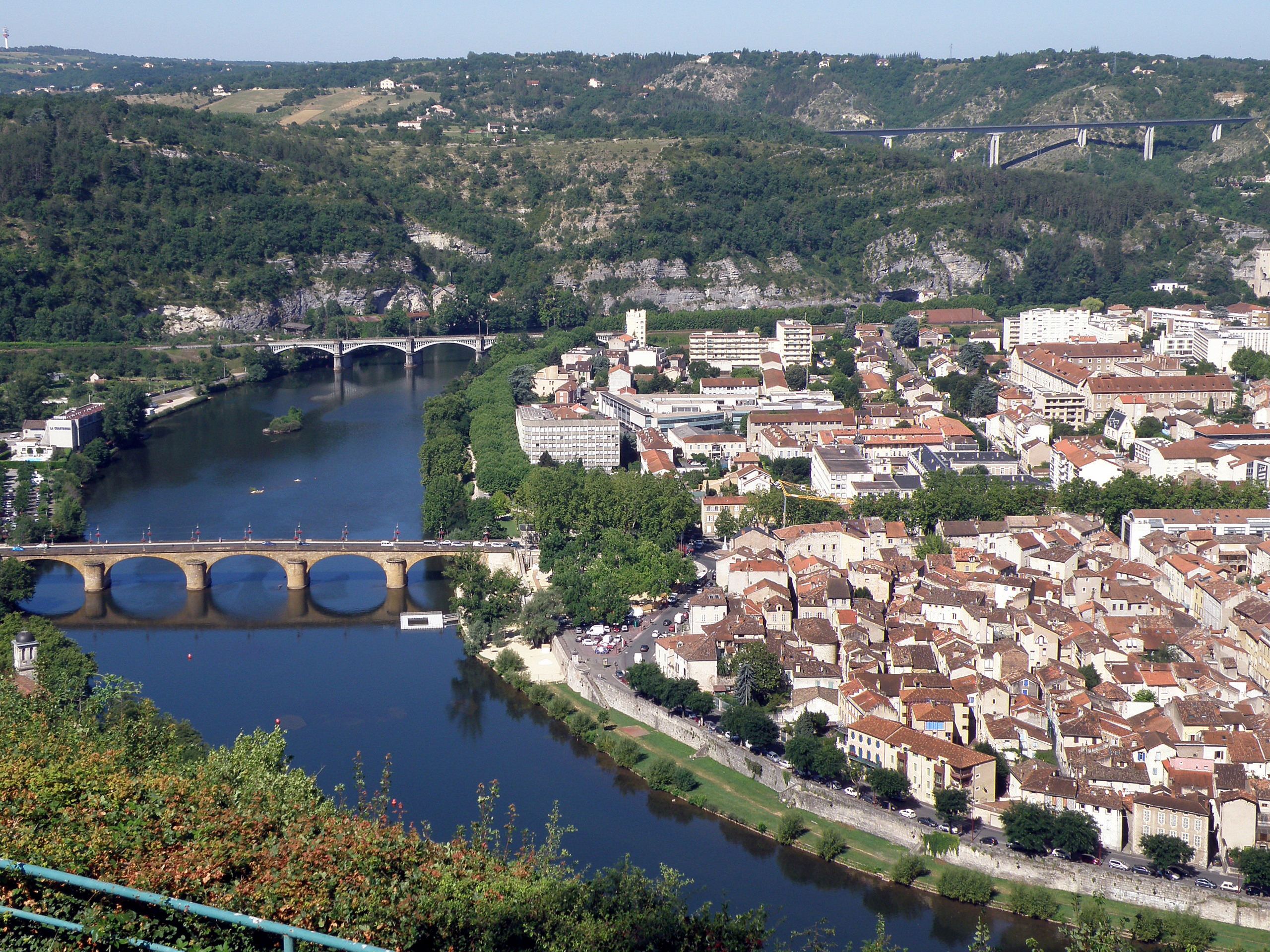 Cahors (Lot, France). Vue prise du mont Saint-Cyr, au sud et sud-est de la ville. Regard vers l'ouest.